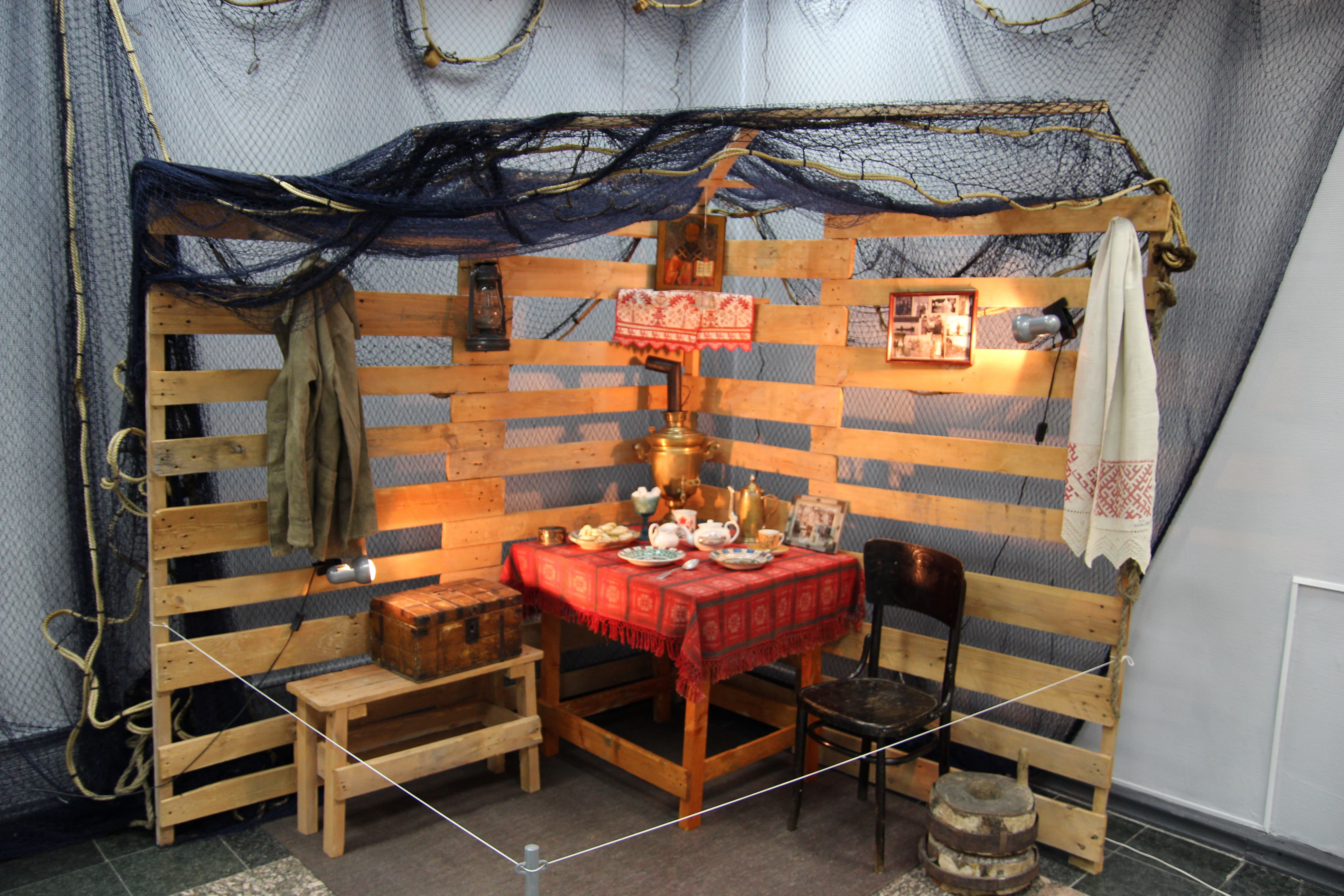 Кухня норвежских колонистов